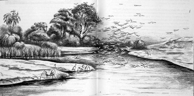 Vol d'aigrettes au marigot de Hann (Dakar, Sénégal) (illustration dans Côte occidentale d'Afrique, 1890, par Colonel Frey) [Fig. en dble page pp.180-181 :] [Cote : Réserve A 200 386]